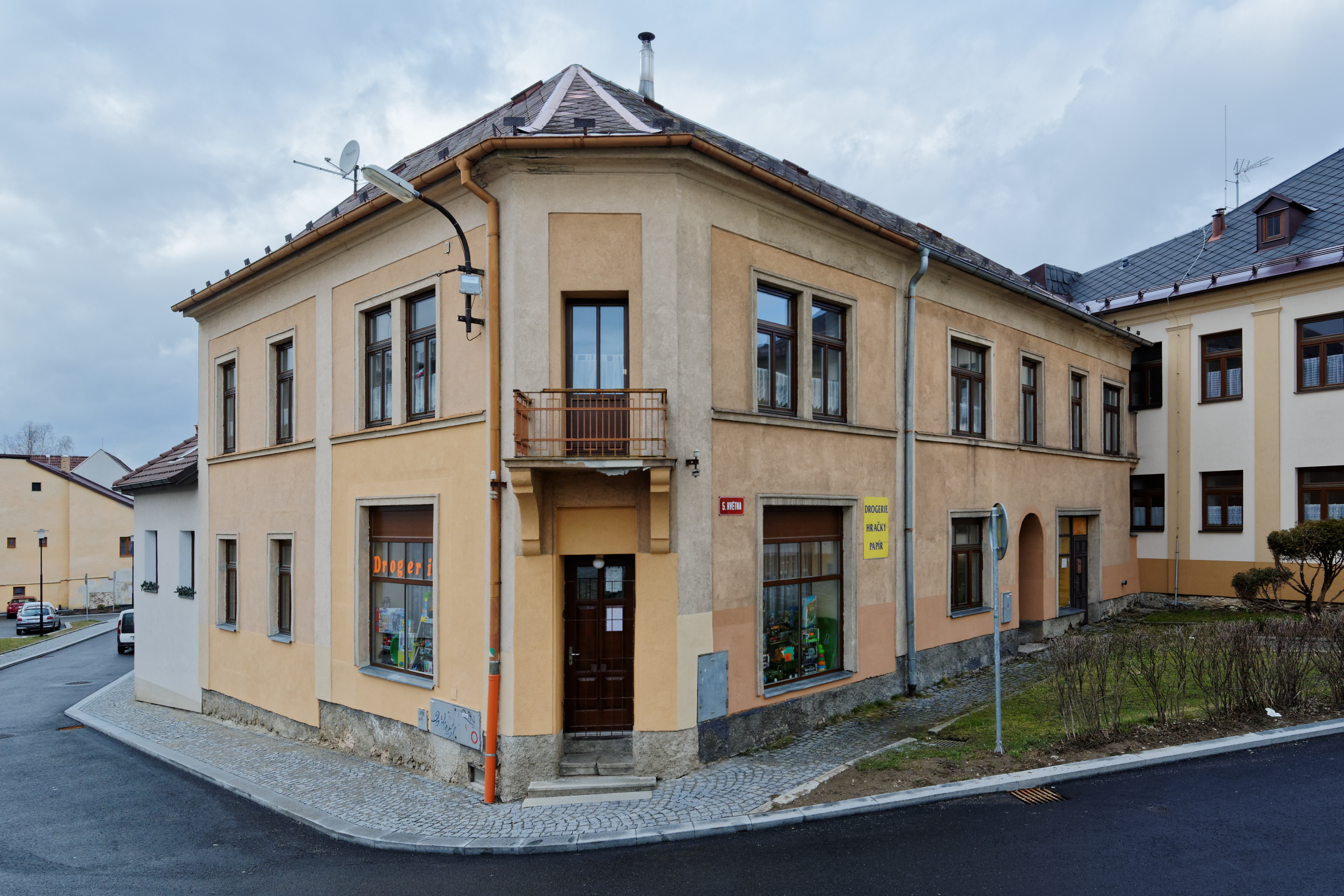 Dům čp. 143, Volary, ulice 5. května. Rodný dům Rudolfa Schmida (1924-2005), známého po změně pohlaví pod uměleckým jménem Jeanette Baroness Lips von Lipstrill.